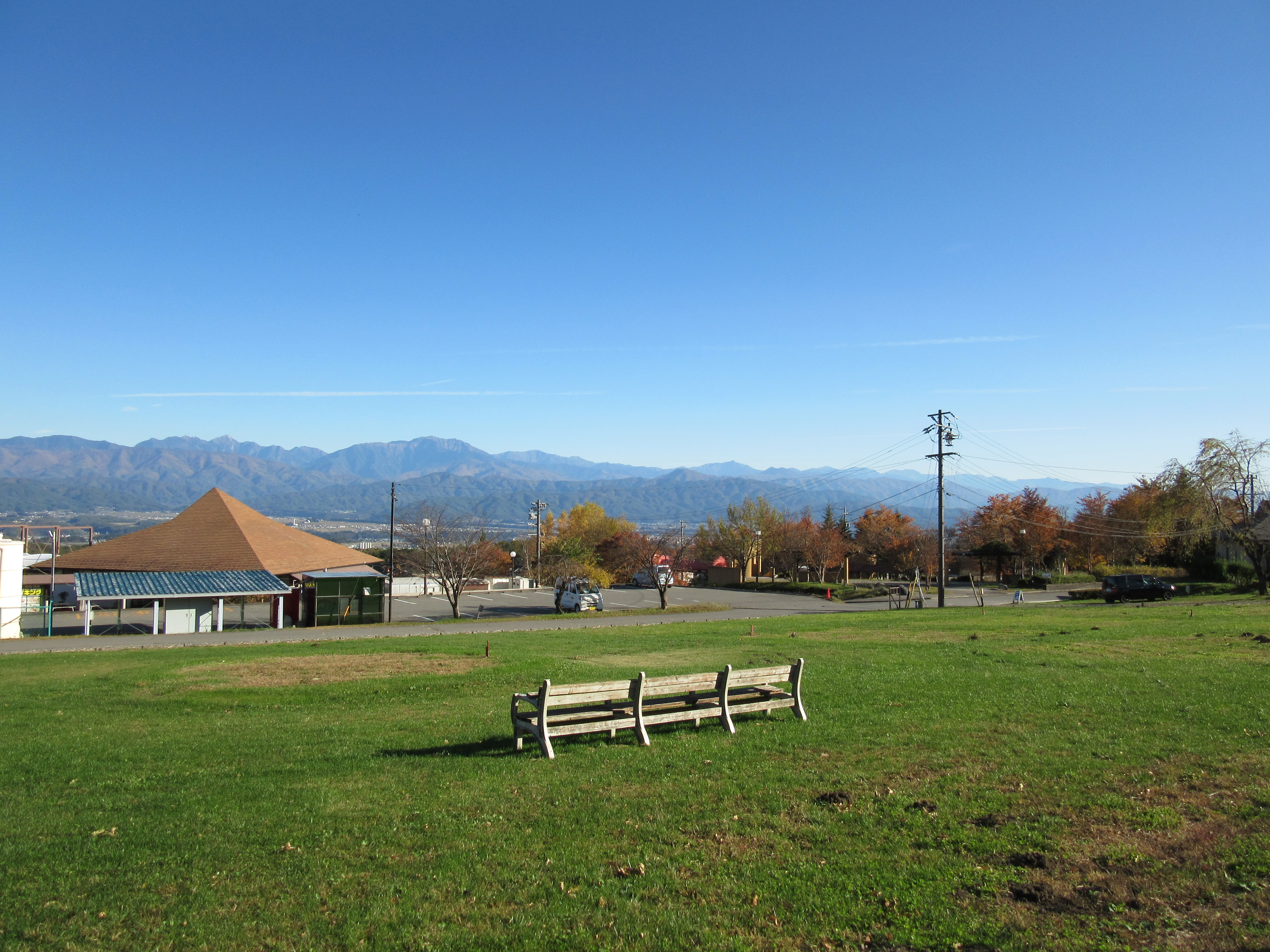 みはらしファーム